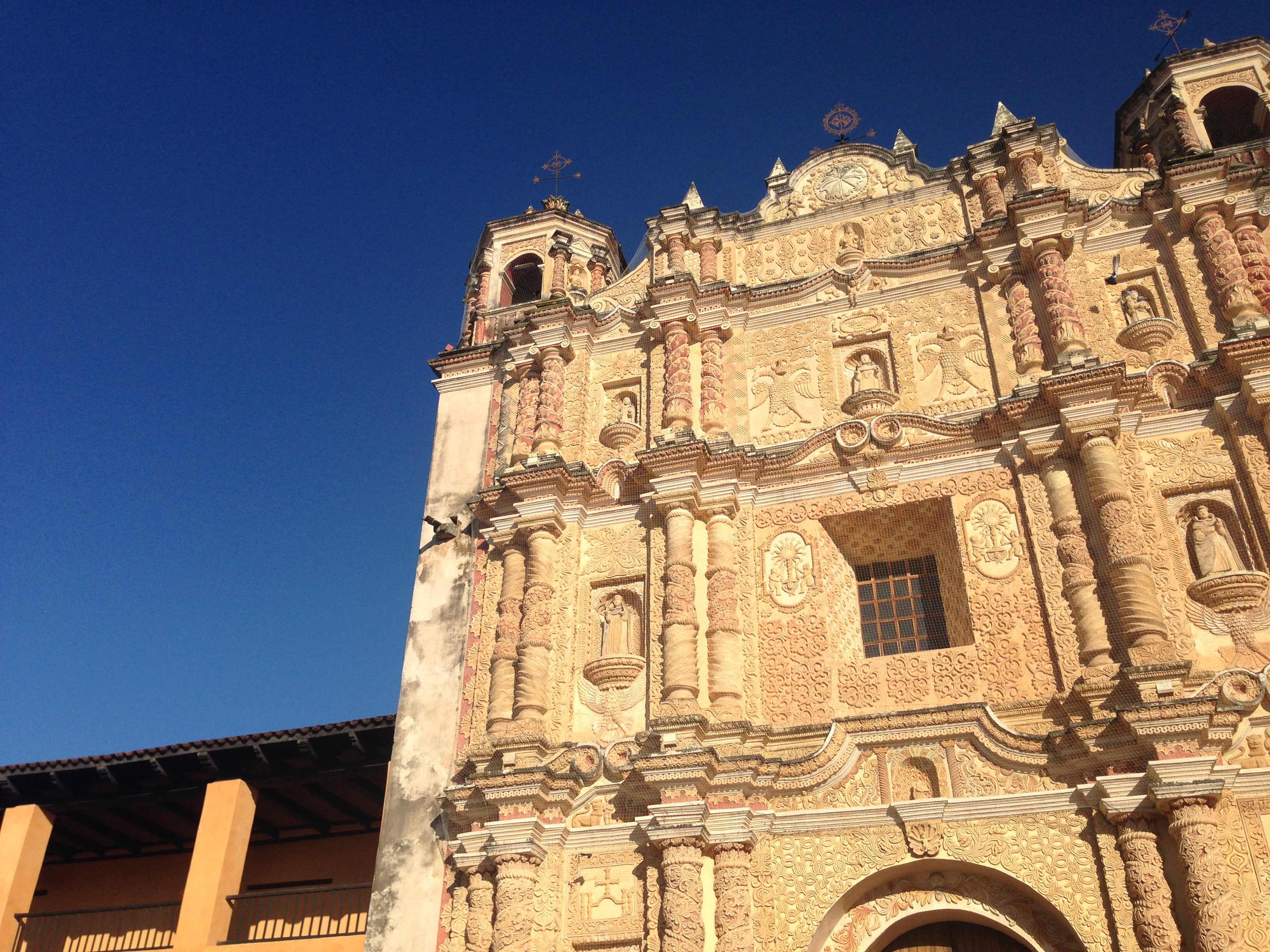 Conociendo Chiapas